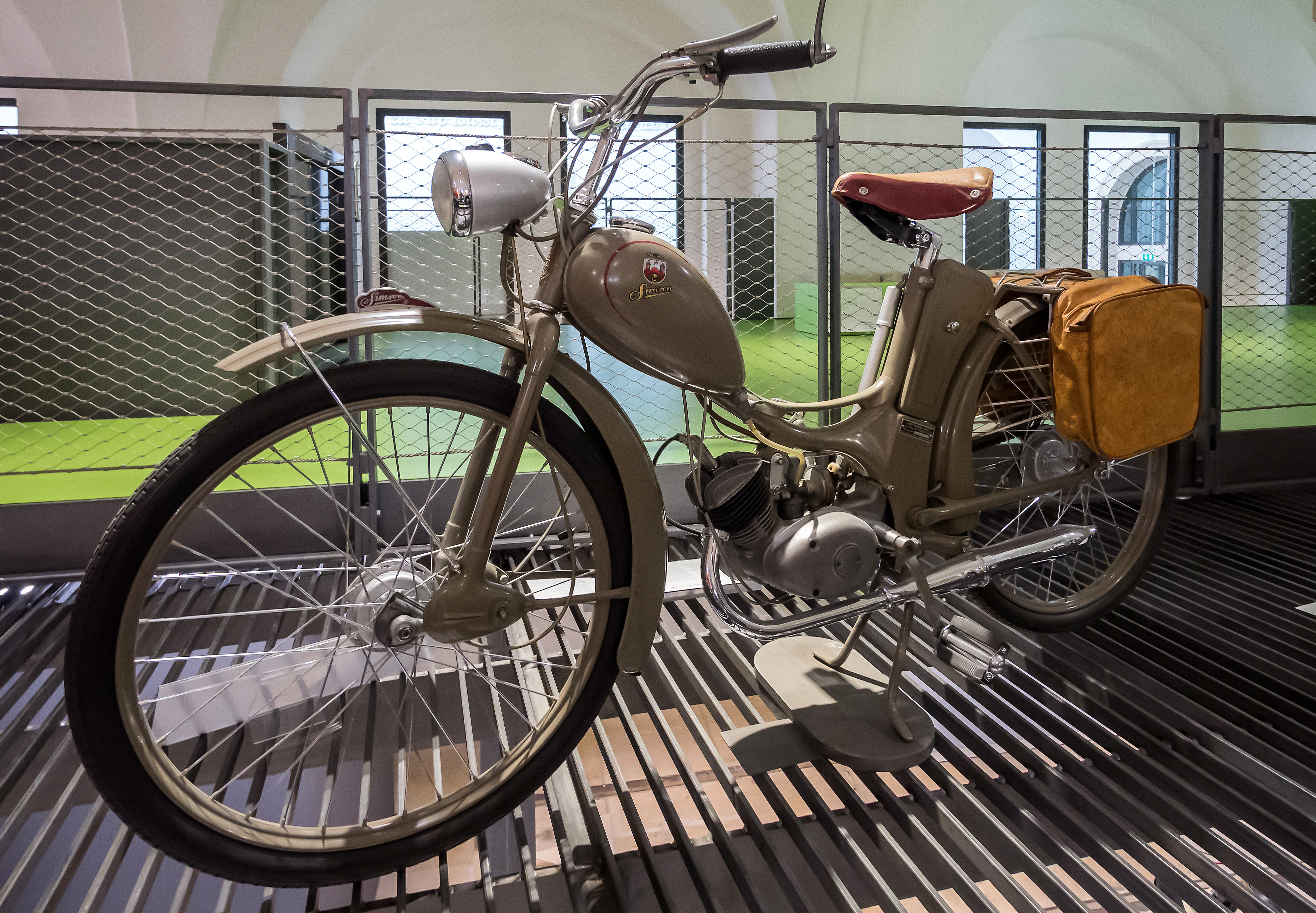 Verkehrsmuseum Dresden Moped Simson SR 1 von 1956 II